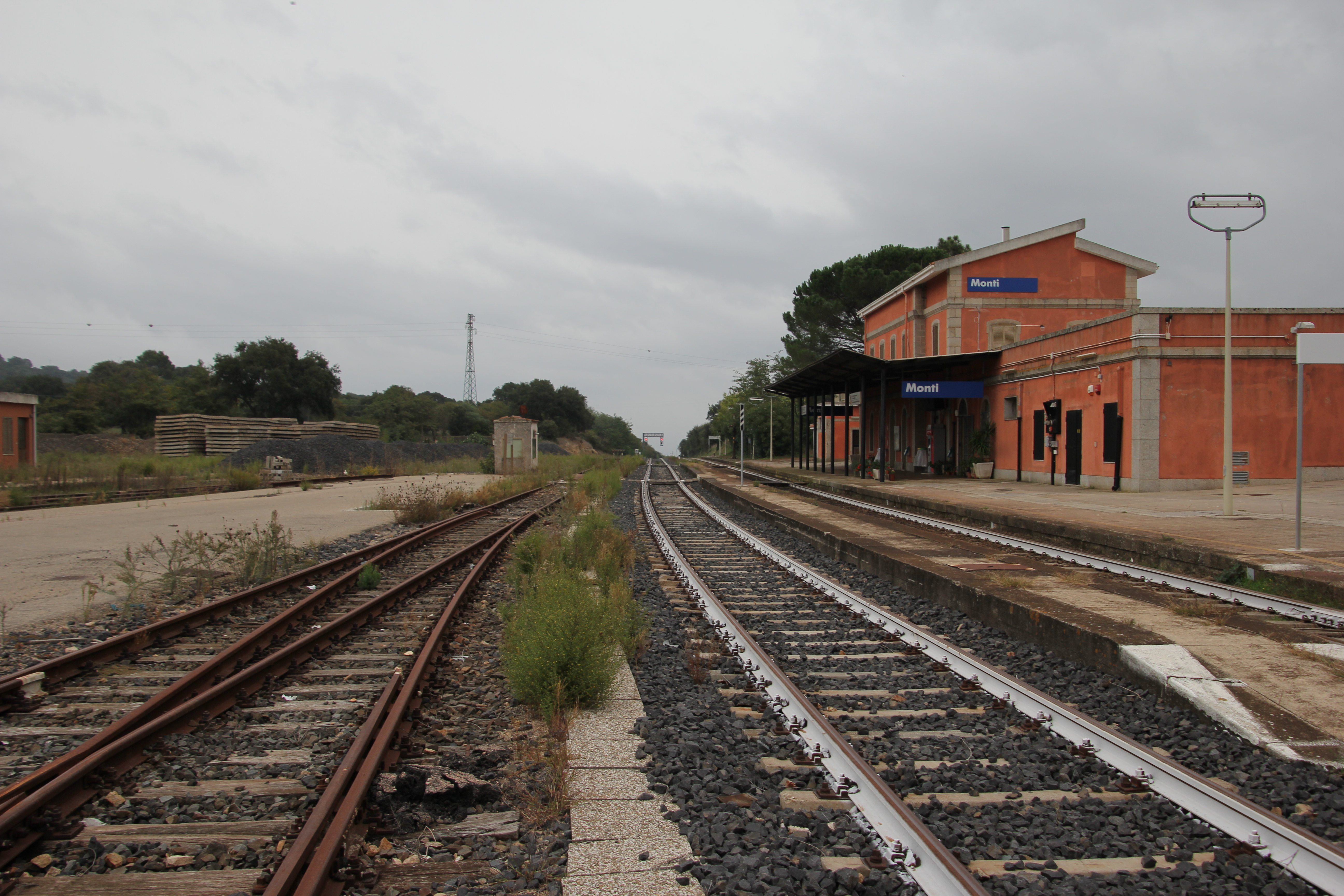 Monti, stazione ferroviaria